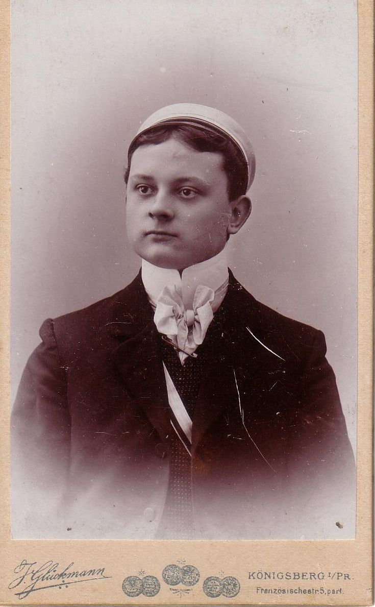 Porträtfotografie von Walter Telemann